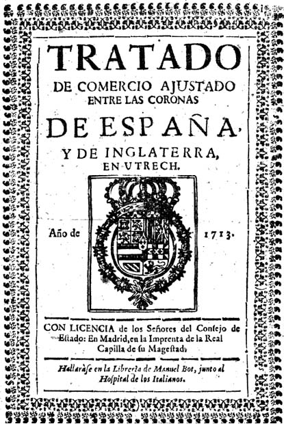 Tratado de comercio ajustado entre las Coronas de España y de Inglaterra en Utrech